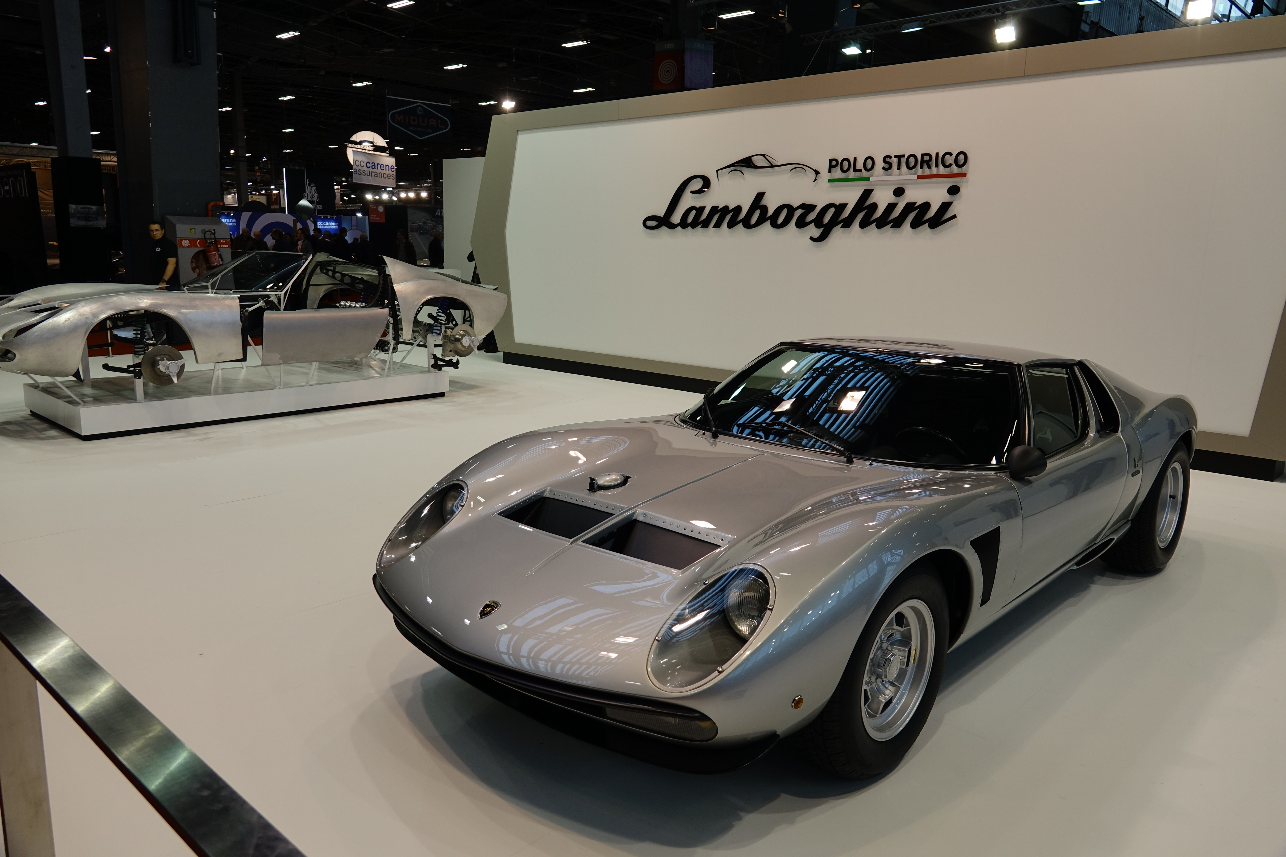 Lamborghini Polo Storico - Lamborghini Miura au salon Rétromobile 2020